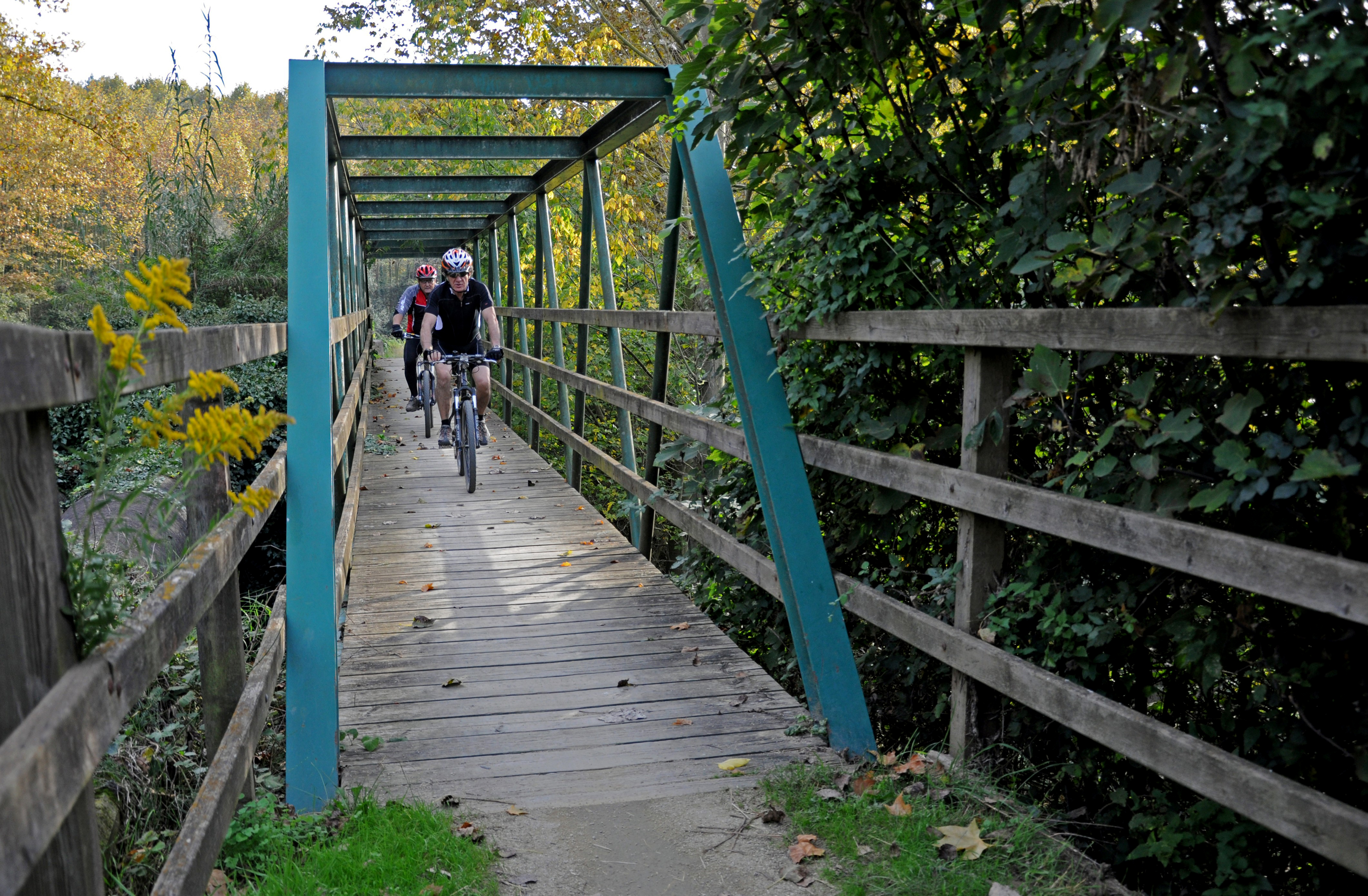 Traçat de l'antic Carrilet de Girona a Olot (Bescanó)